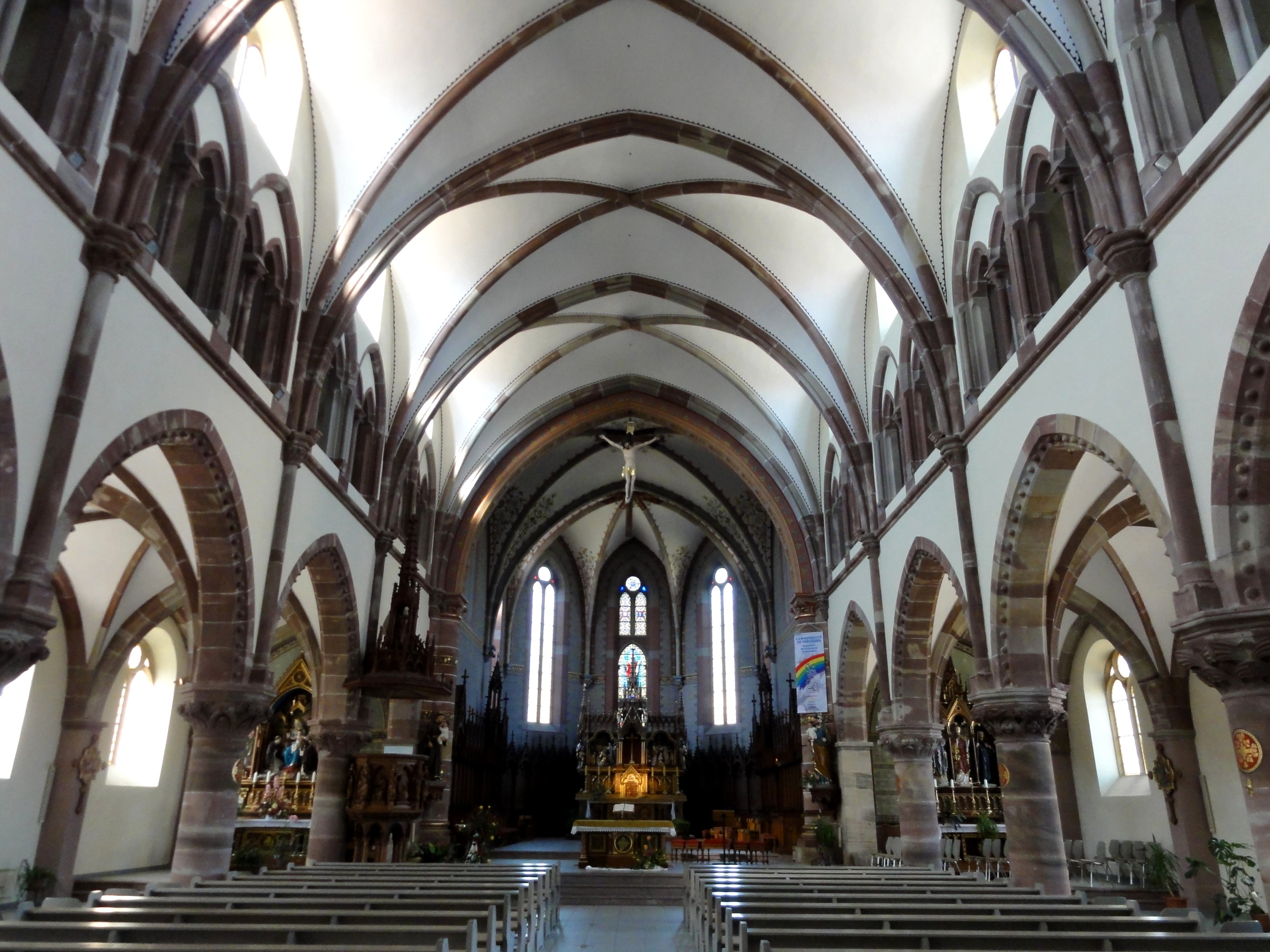 Alsace, Haut-Rhin, Église Saint-Martin (XIIIe-XIXe) de Pfaffenheim (PA00085583, IA68004314): Vue intérieure de la nef vers le chœur néo-gothique.